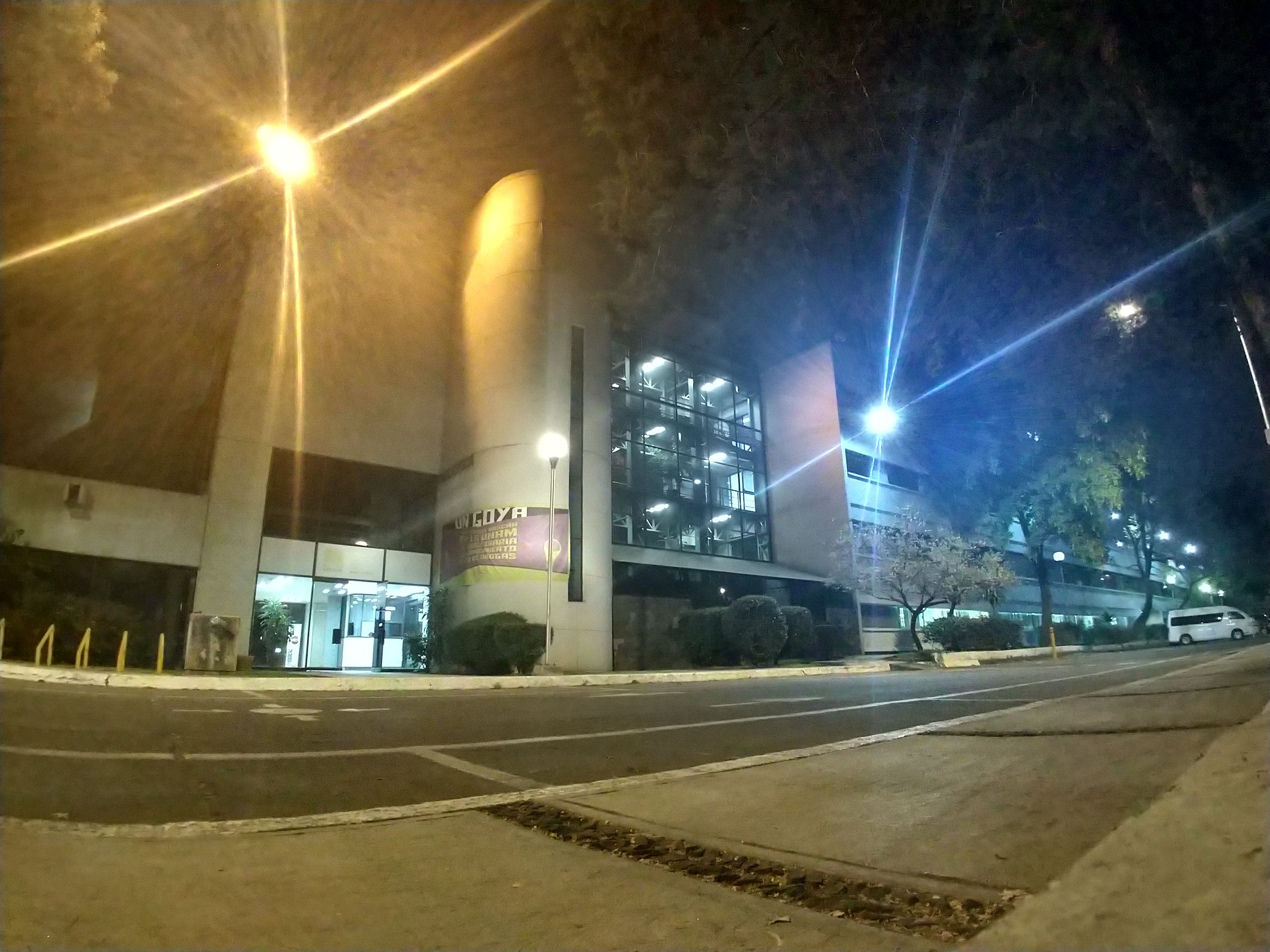 Instituto de Investigaciones en Matemáticas Aplicadas y en Sistemas de la UNAM